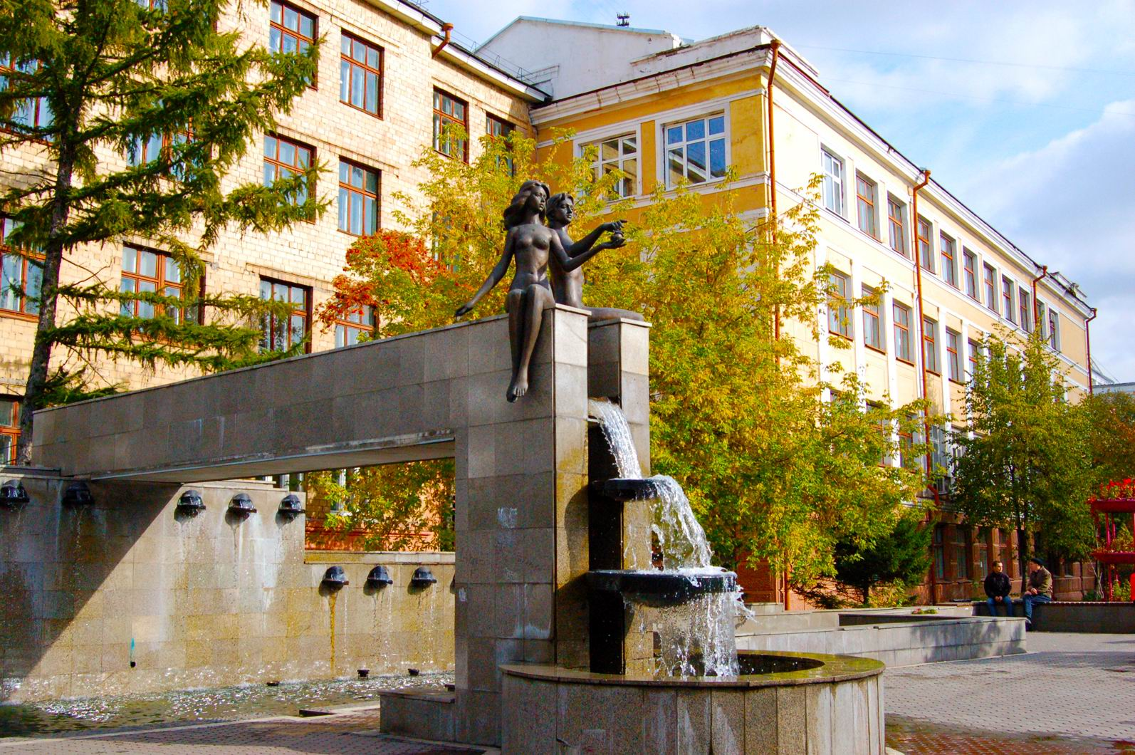 Технологический университет.пр.Мира.